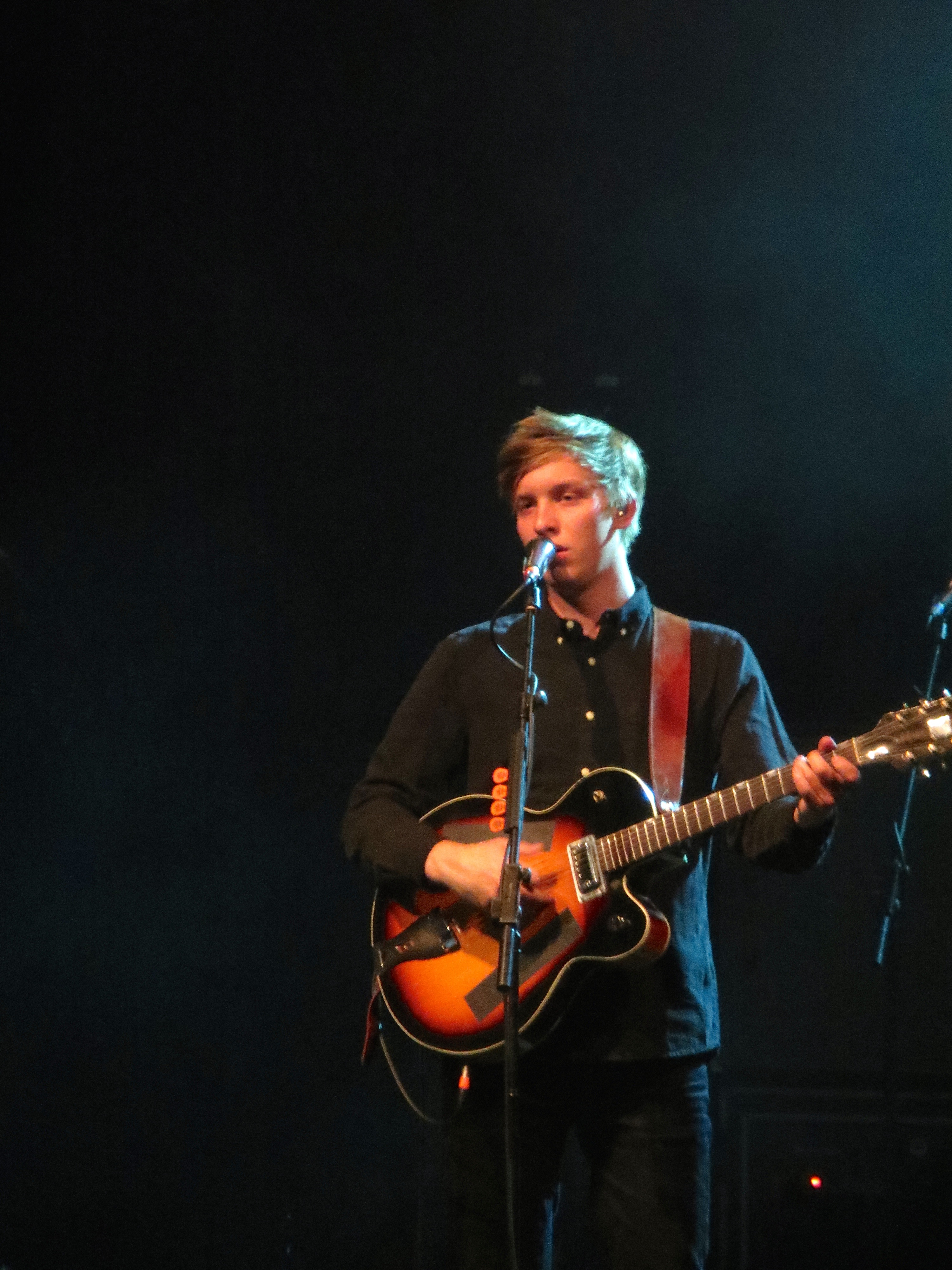 George Ezra 1